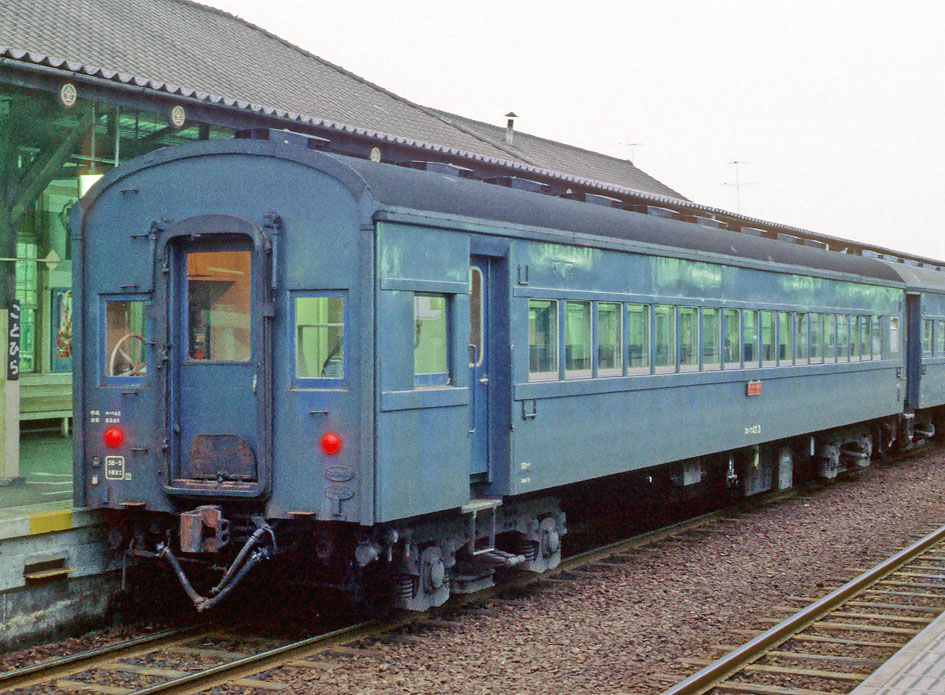 国鉄 スハフ43 3